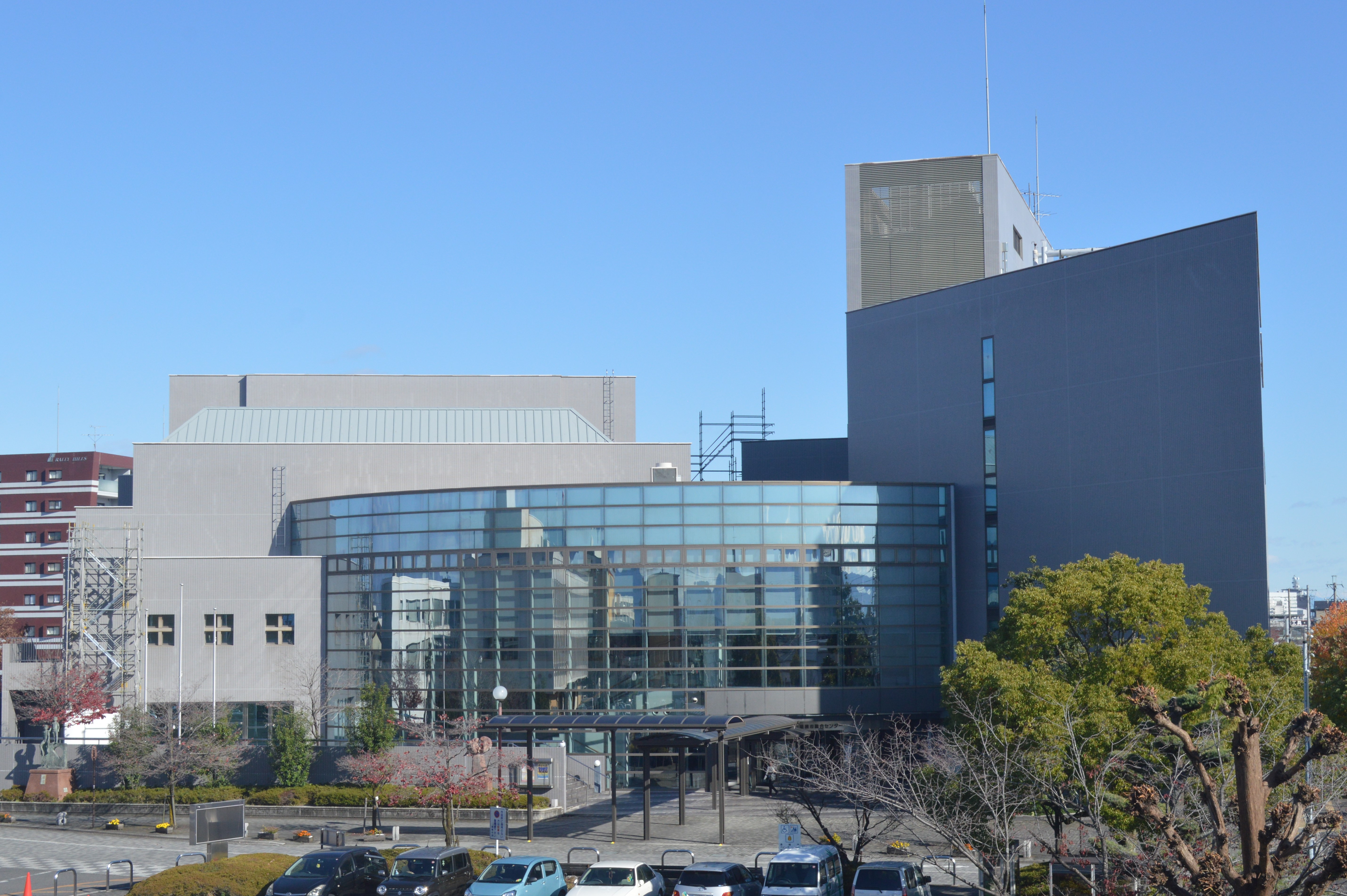 岐阜県瑞穂市の瑞穂市総合センター。